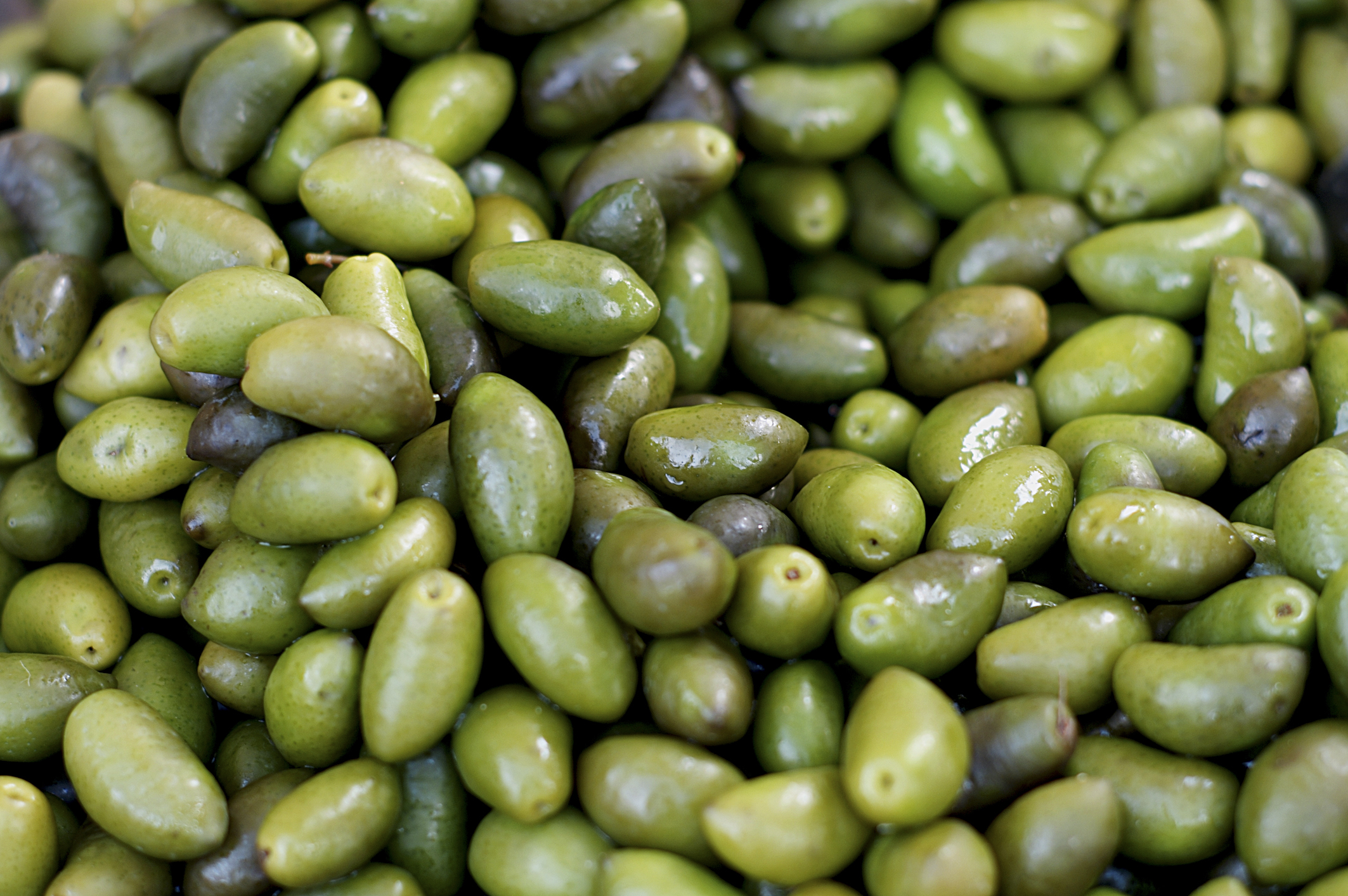 INRA, Jean Weber